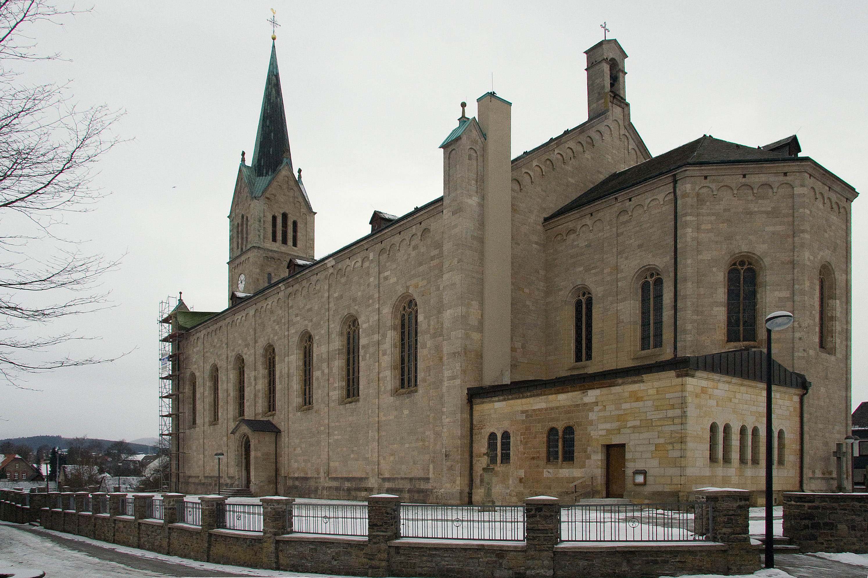 Südostseite der Pfarrkirche St. Peter und Paul in Medebach